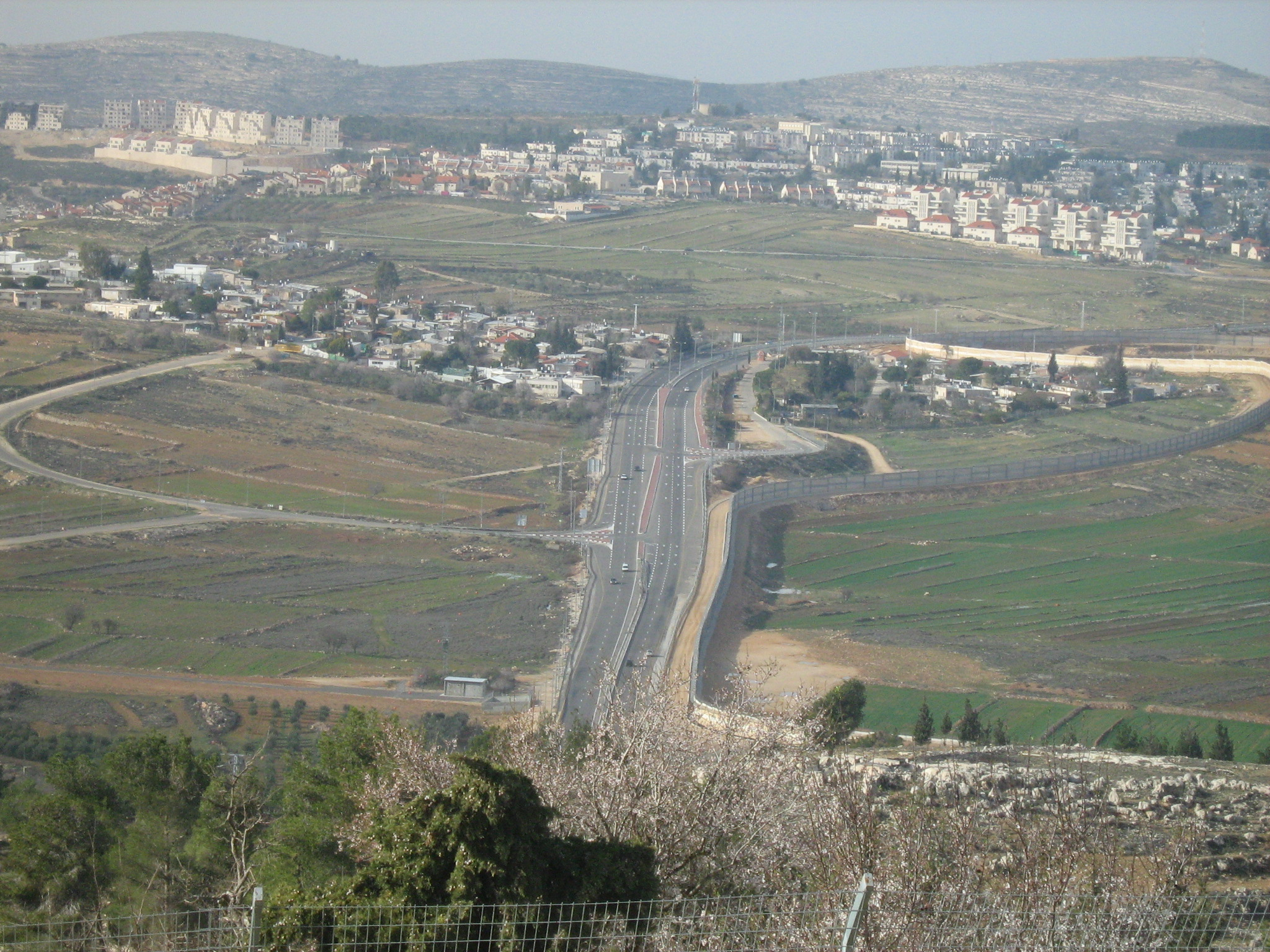 מבט מקבר שמואל על גבעת זאב ומחנה גבעון